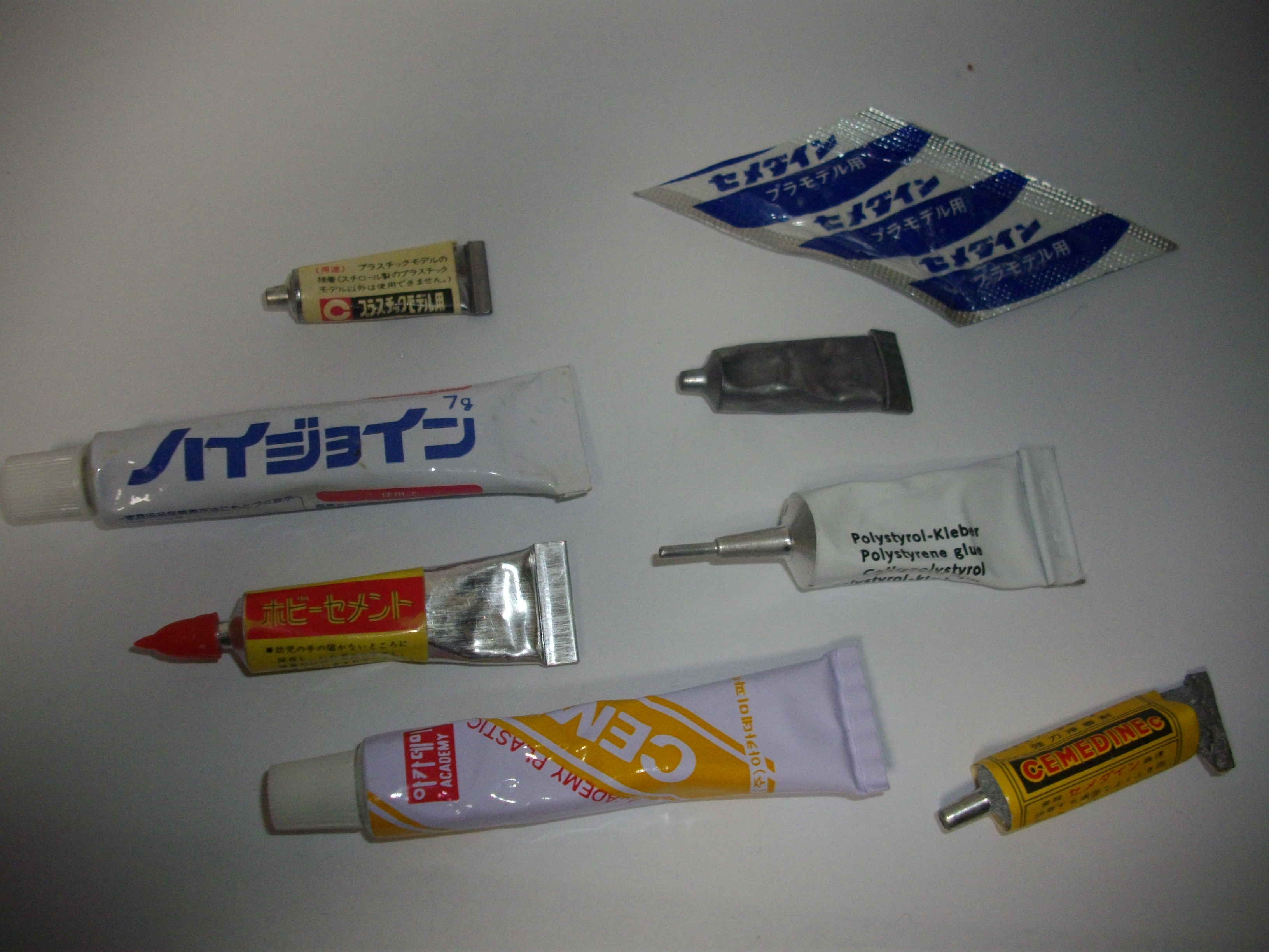 プラモデル同梱用の接着剤